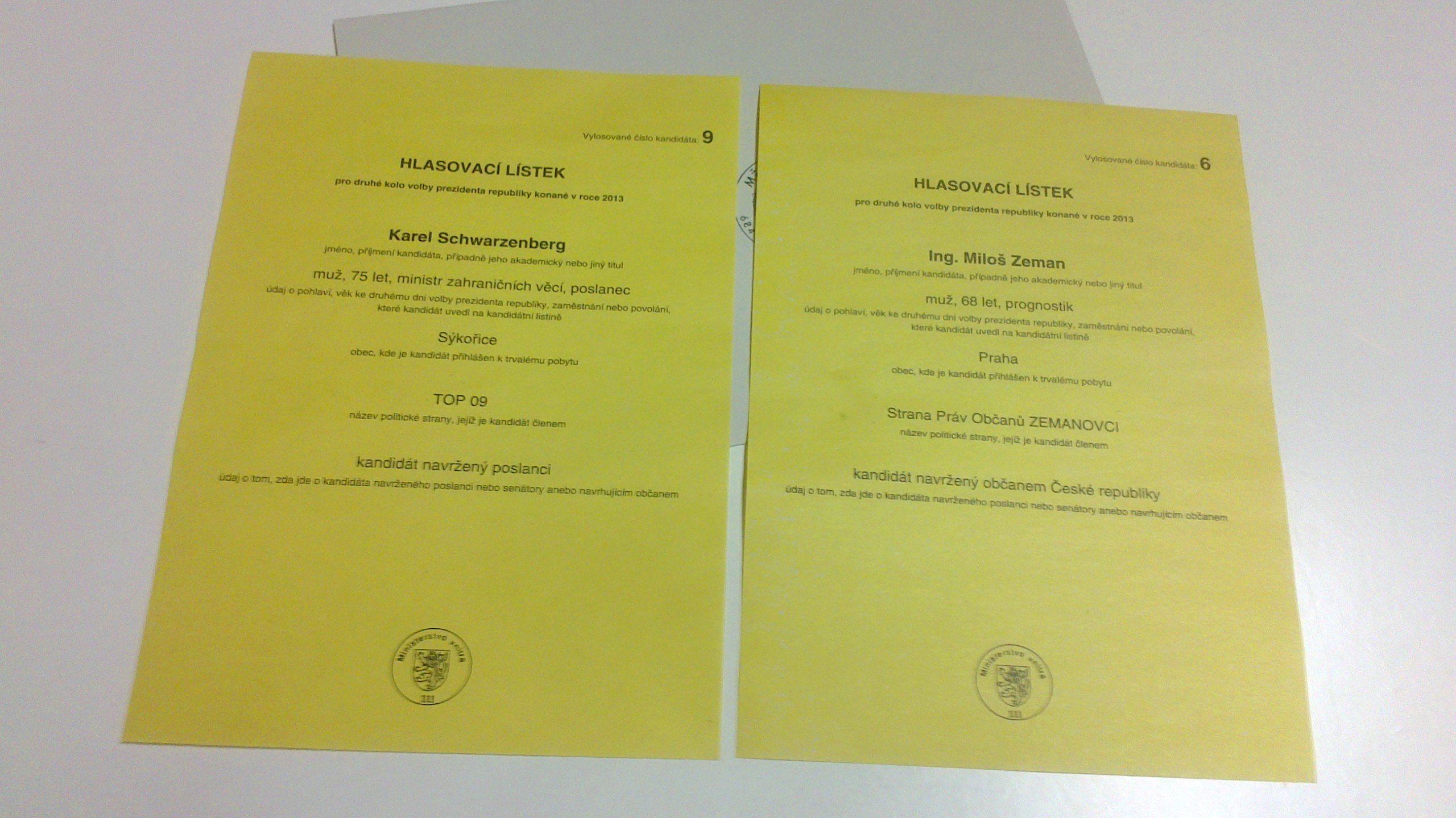 Volební lístky obou kandidátů v 2. kole volby prezidenta České republiky 25.-26. 1. 2013.